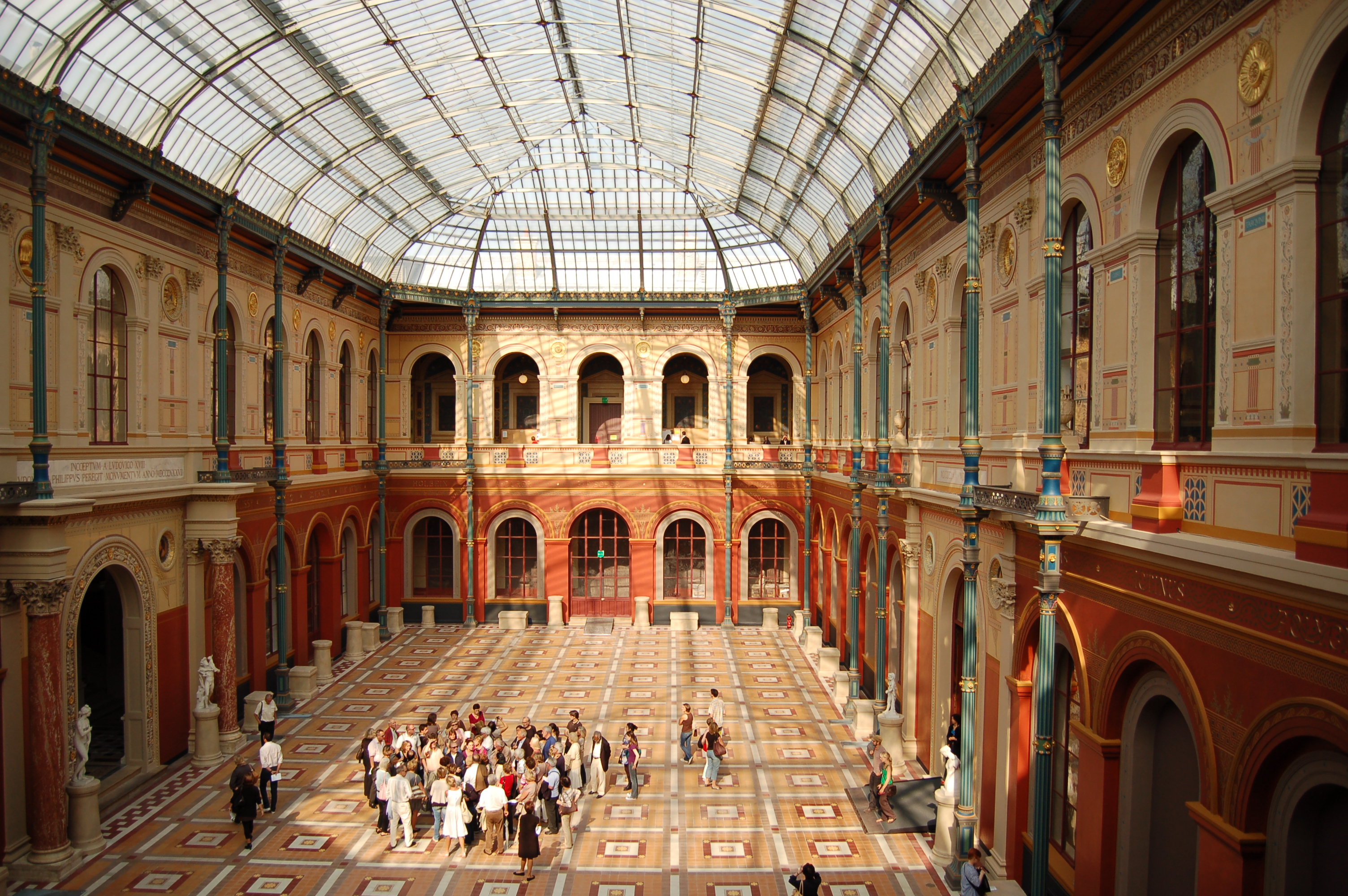 École Nationale Supérieure des Beaux-Arts, Cour intérieur